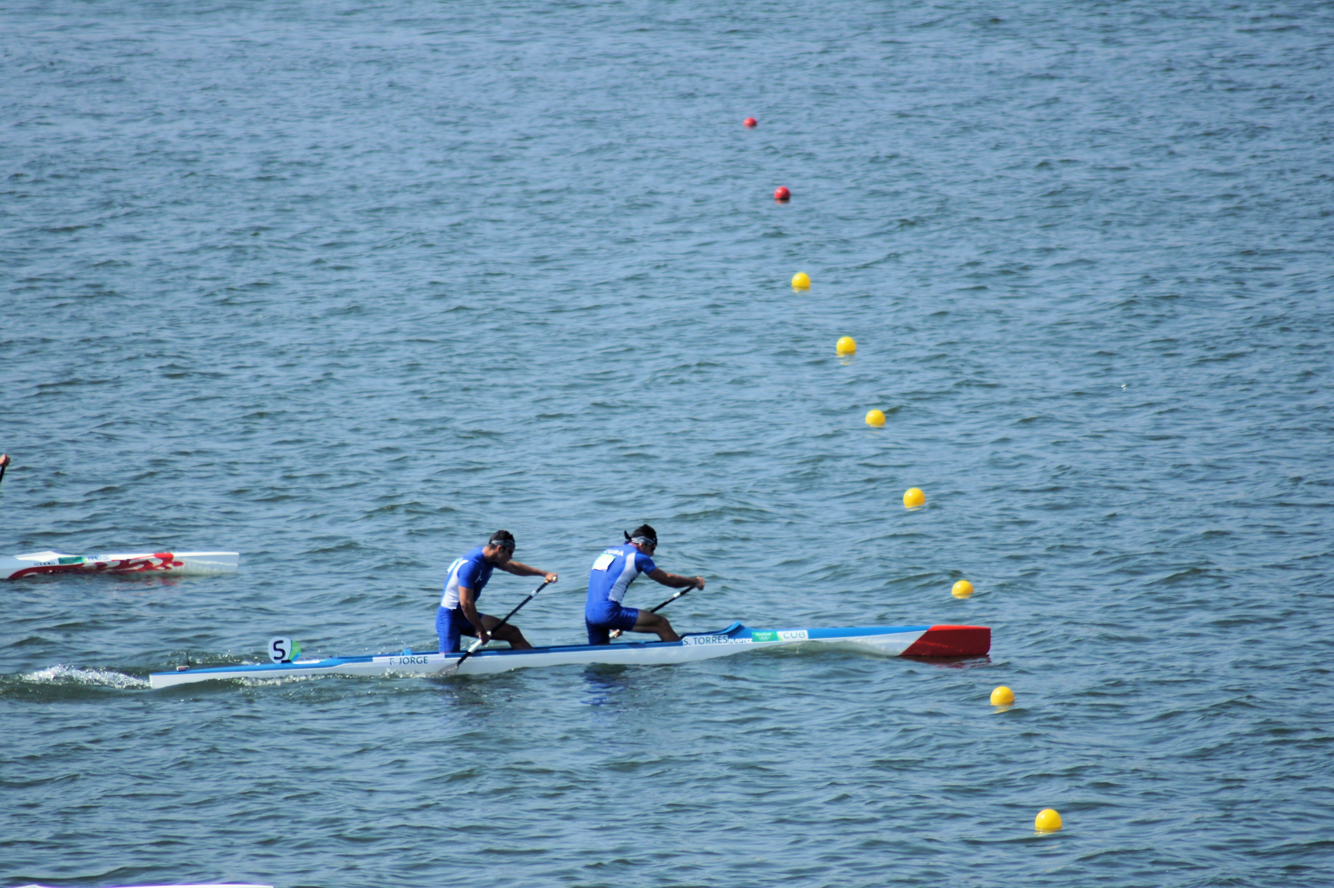 Rio 2016. Canoagem de velocidade/Canoe sprint